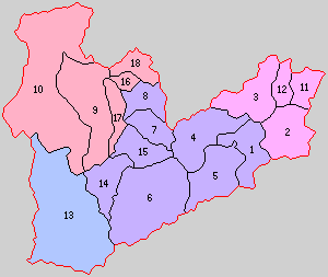 福島県南会津郡の町村。